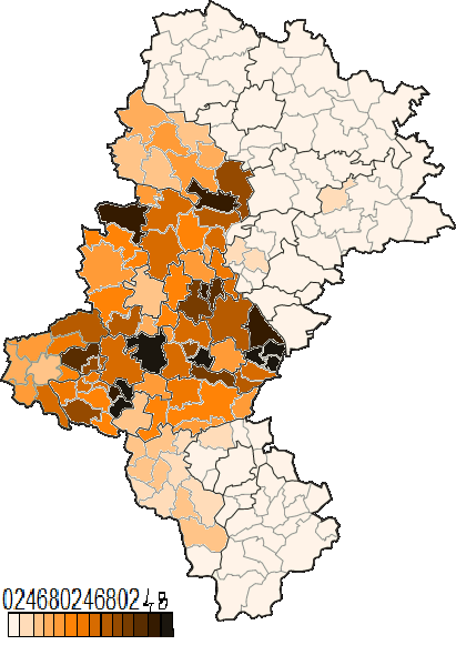 Wyniki RAŚ w wyborach do sejmiku wg gmin (2010) zob. też wyniki szczegółowe dla Śląska Cieszyńskiego: File:Silesian Autonomy Movement In Cieszyn Silesia 2010.png